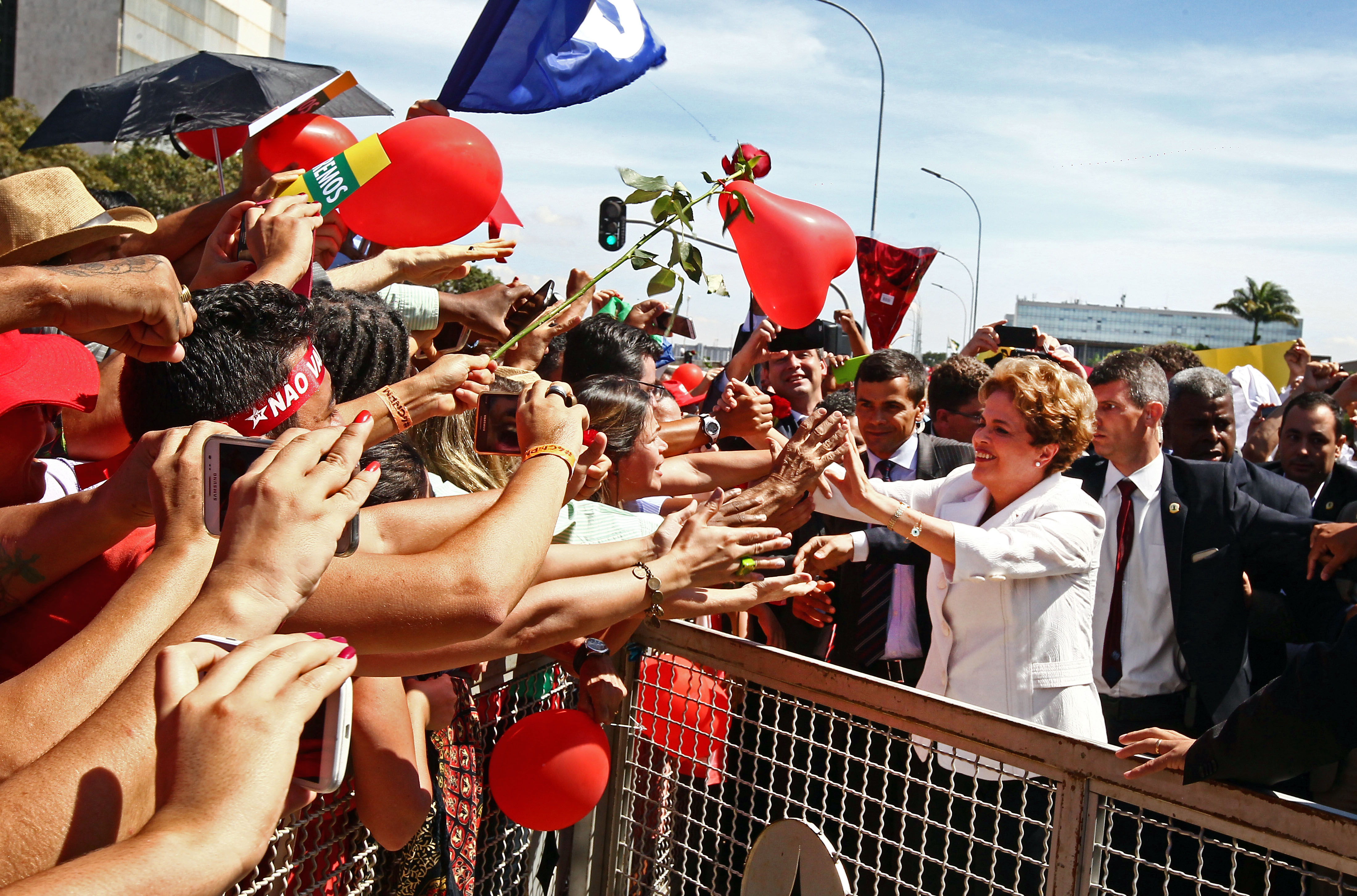 Presidente afastada Dilma Rousseff vai ao encontro de simpatizantes após ser notificada de seus afastamento, em frente ao Palácio do Planalto.